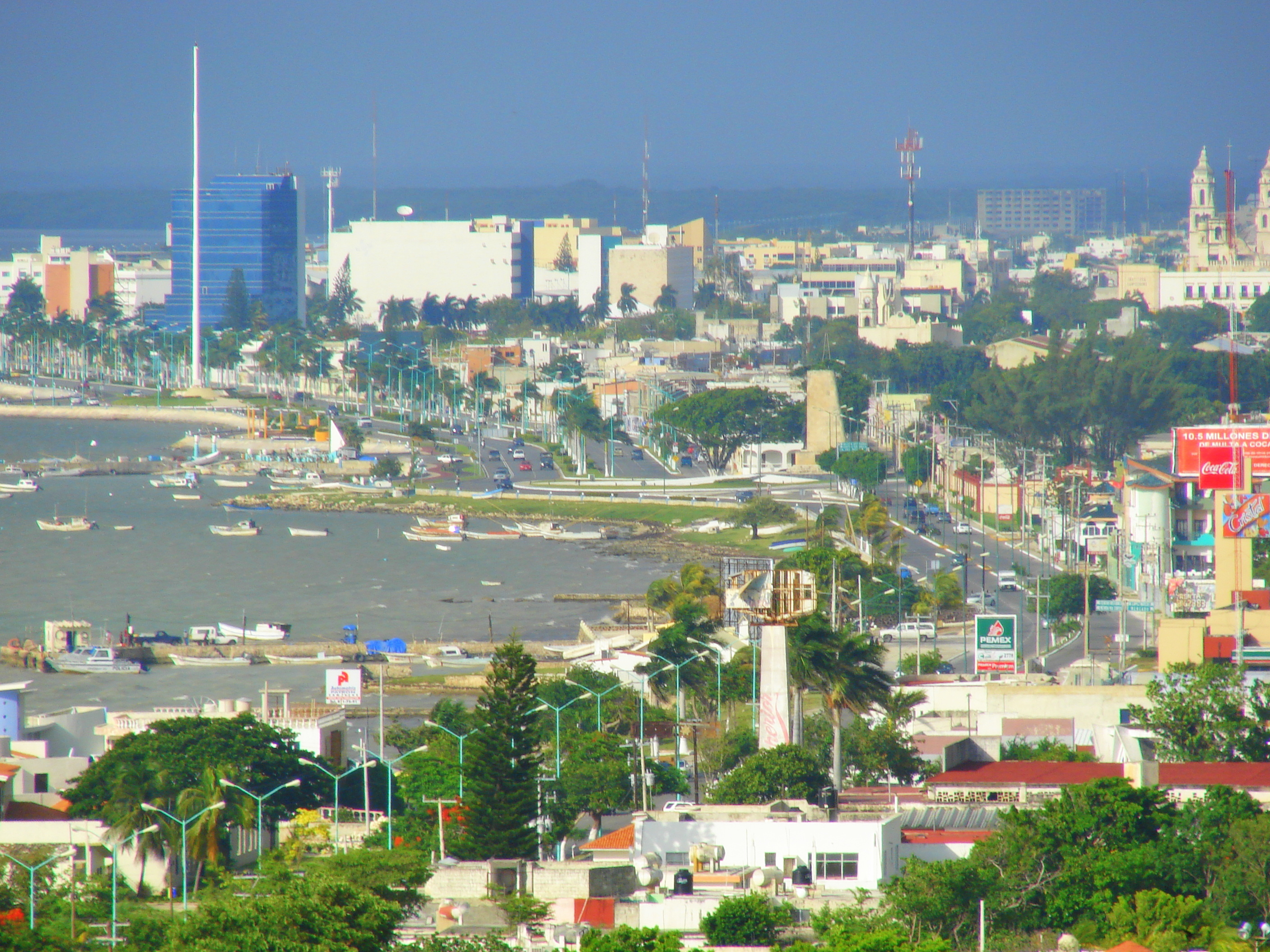 San Francisco de Campeche. Utsikt over San Francisco de Campeche.